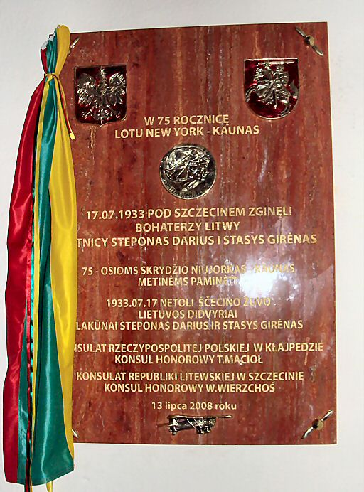 Szczecin Katedra św. Jakuba